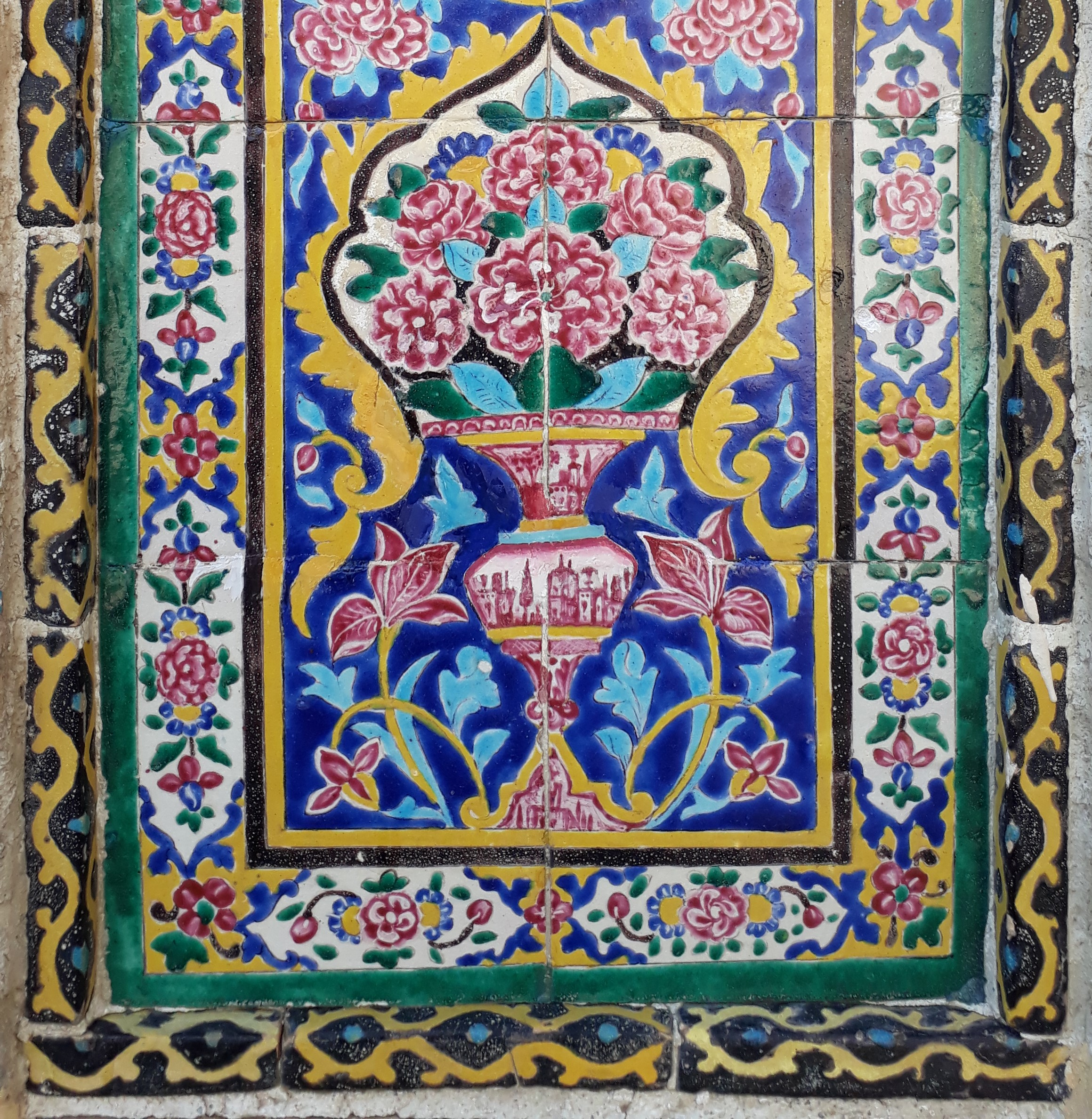 Декоративна керамічна панель, Насір оль-Мольк, Шираз